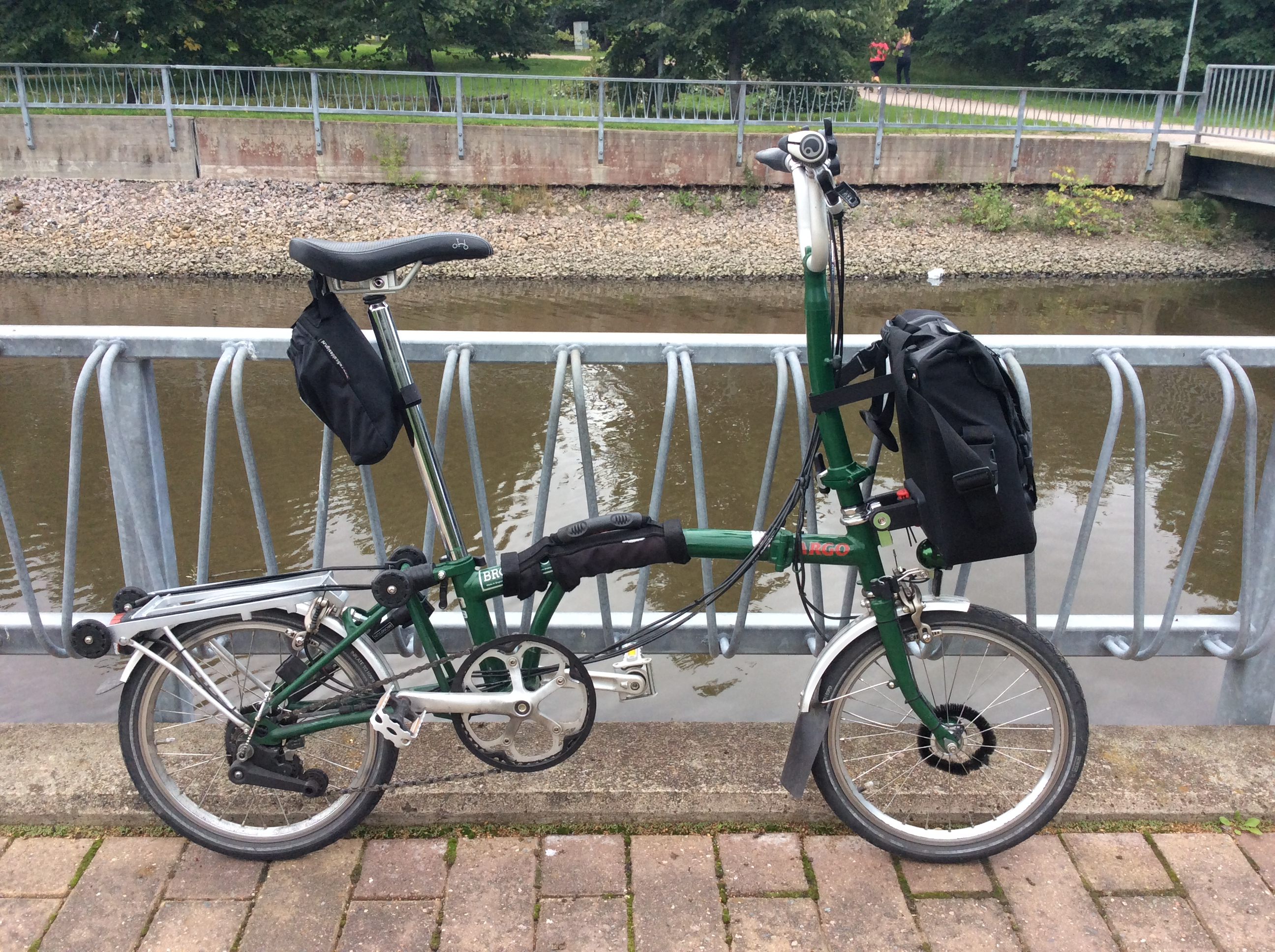 Brompton polkupyörä